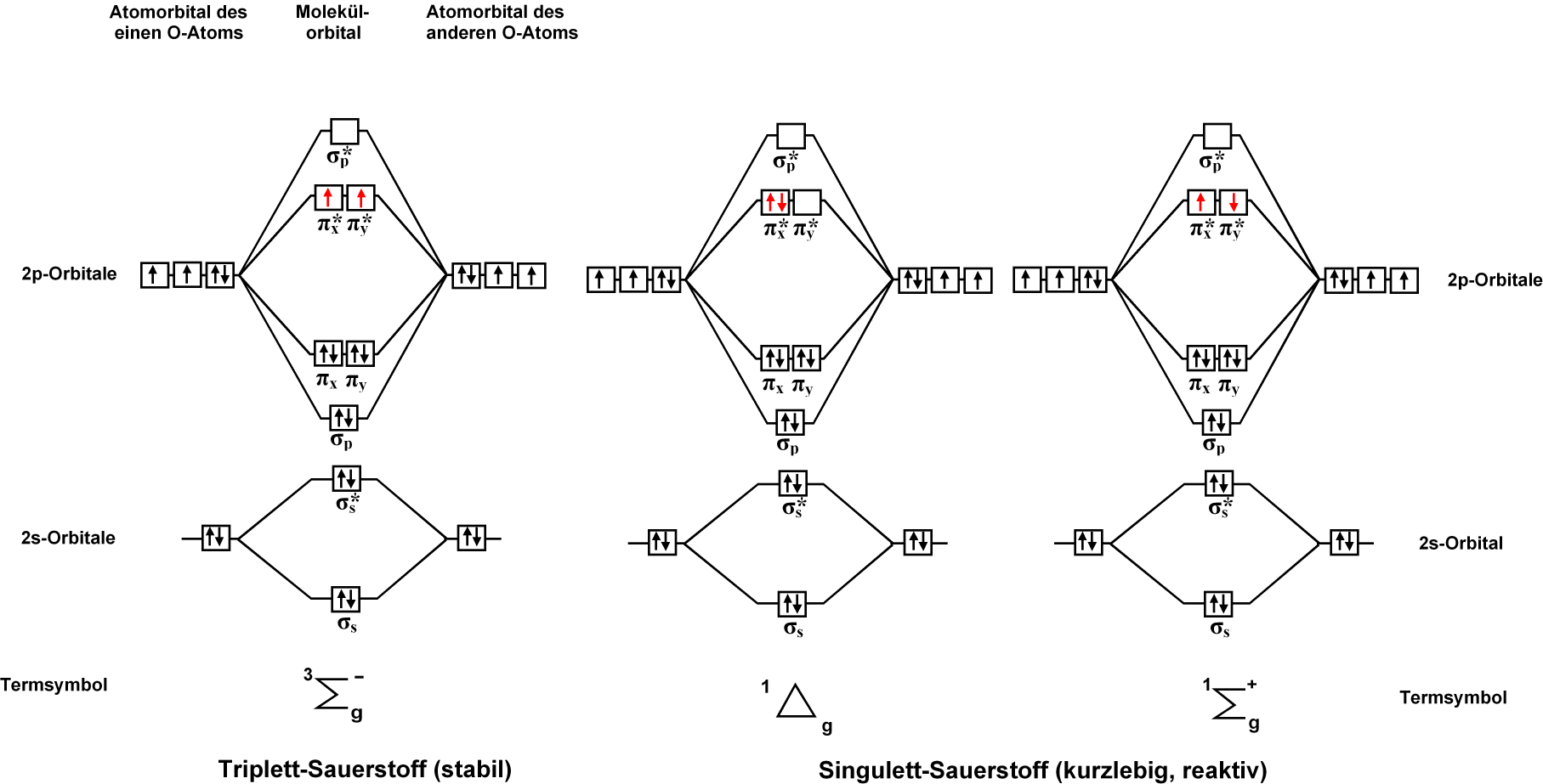 MO-Schema O2